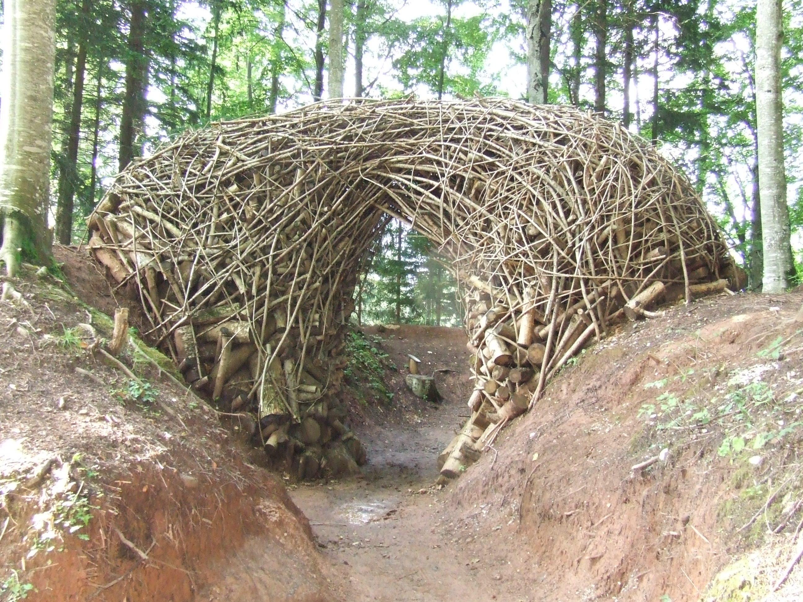 Kapu az erdőben, a kapu archetipikus jelentéssel bír